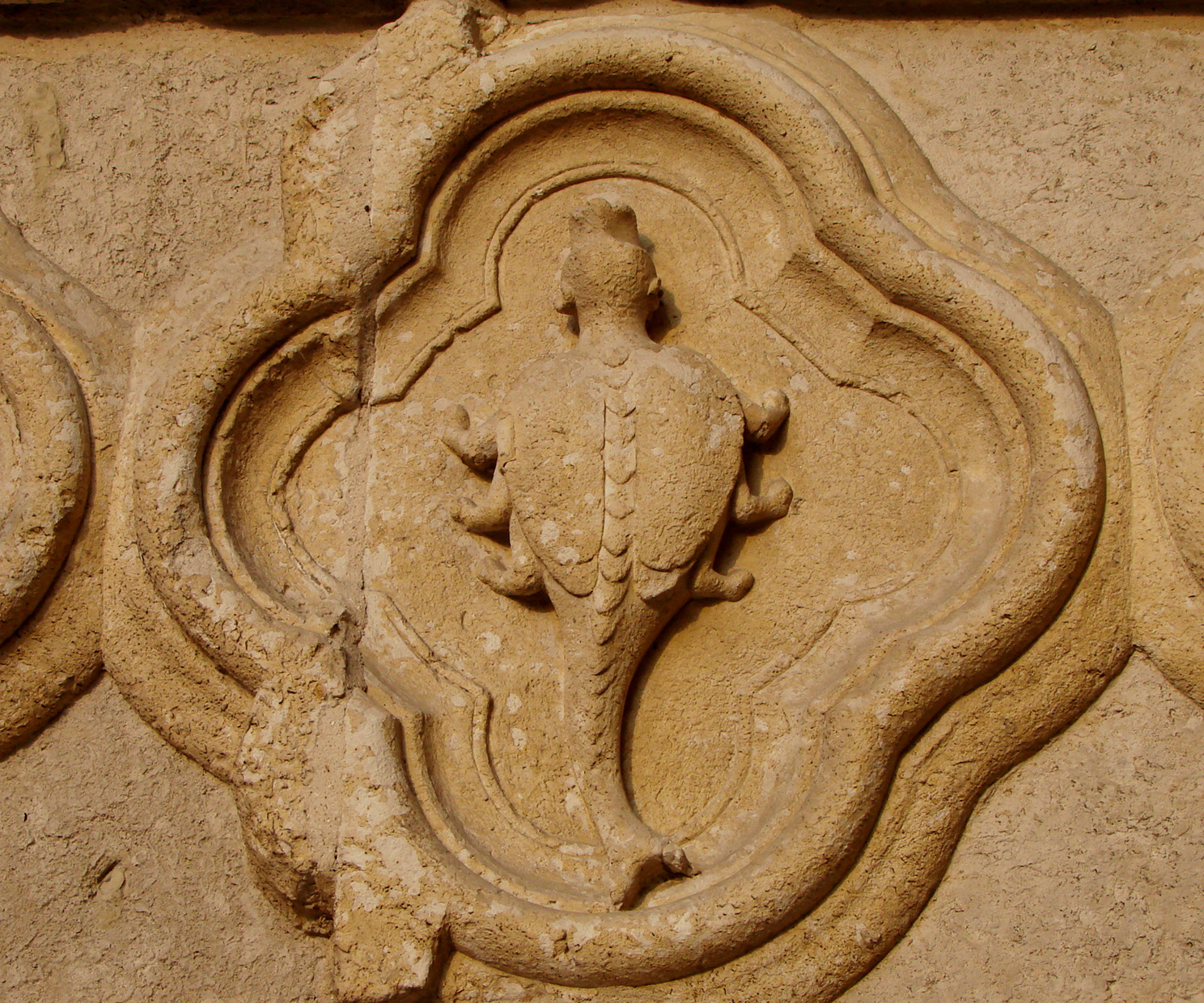 Le scorpion (Scorpius) ;un des signes du zodiaque complet figurant sur le portail gauche de la façade de la cathédrale d'Amiens.